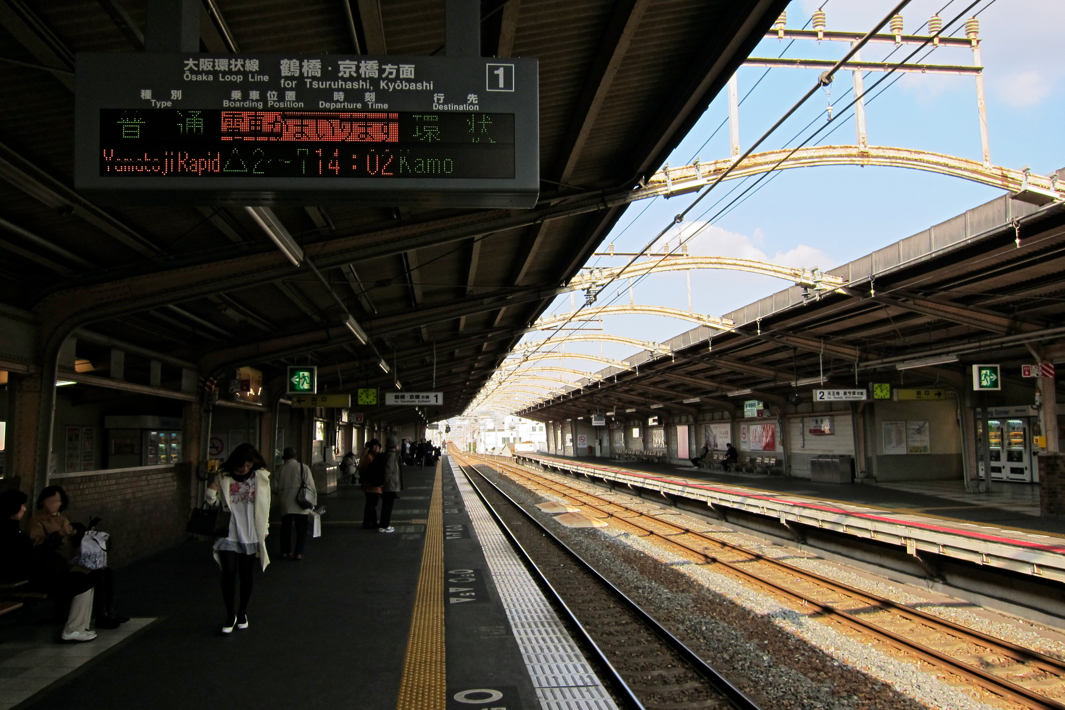 Momodani Station (JR桃谷駅) at Osaka City, Japan.